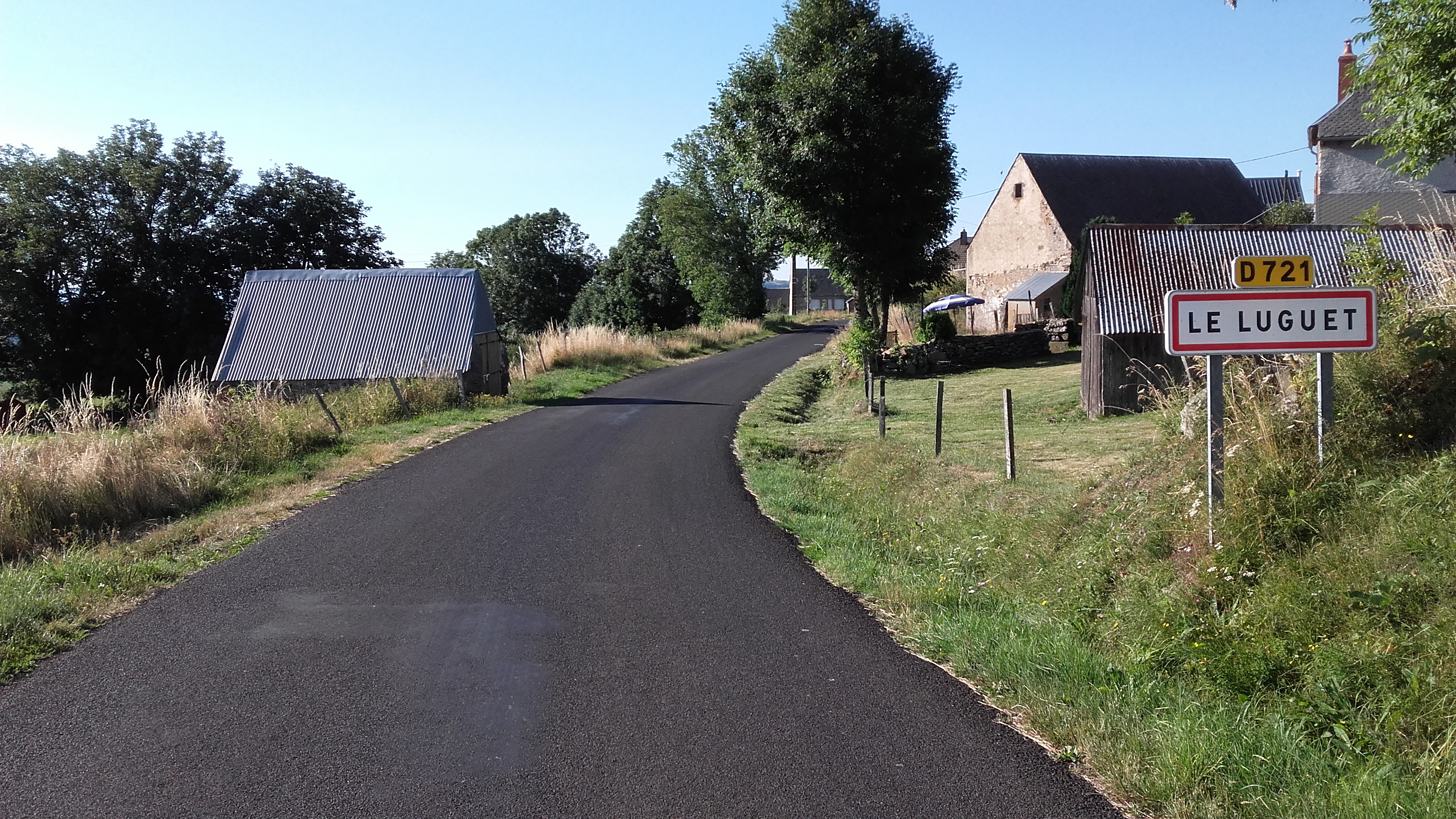 Entrée du Luguet